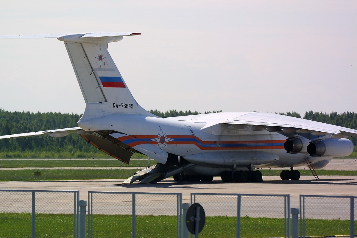 MChS Rossii Ilyushin Il-76